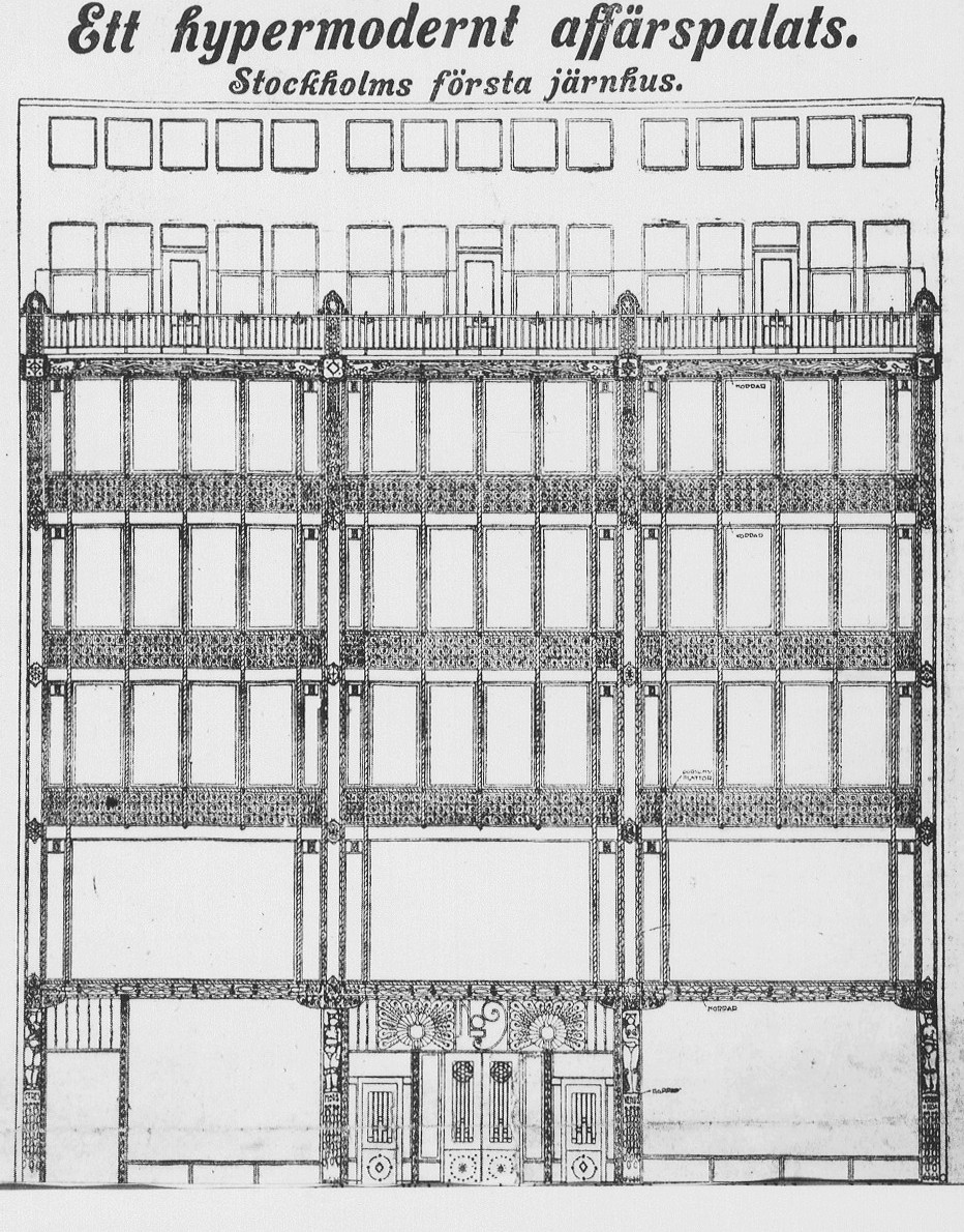 Felix Sachs hus, fasad Regeringsgatan 9